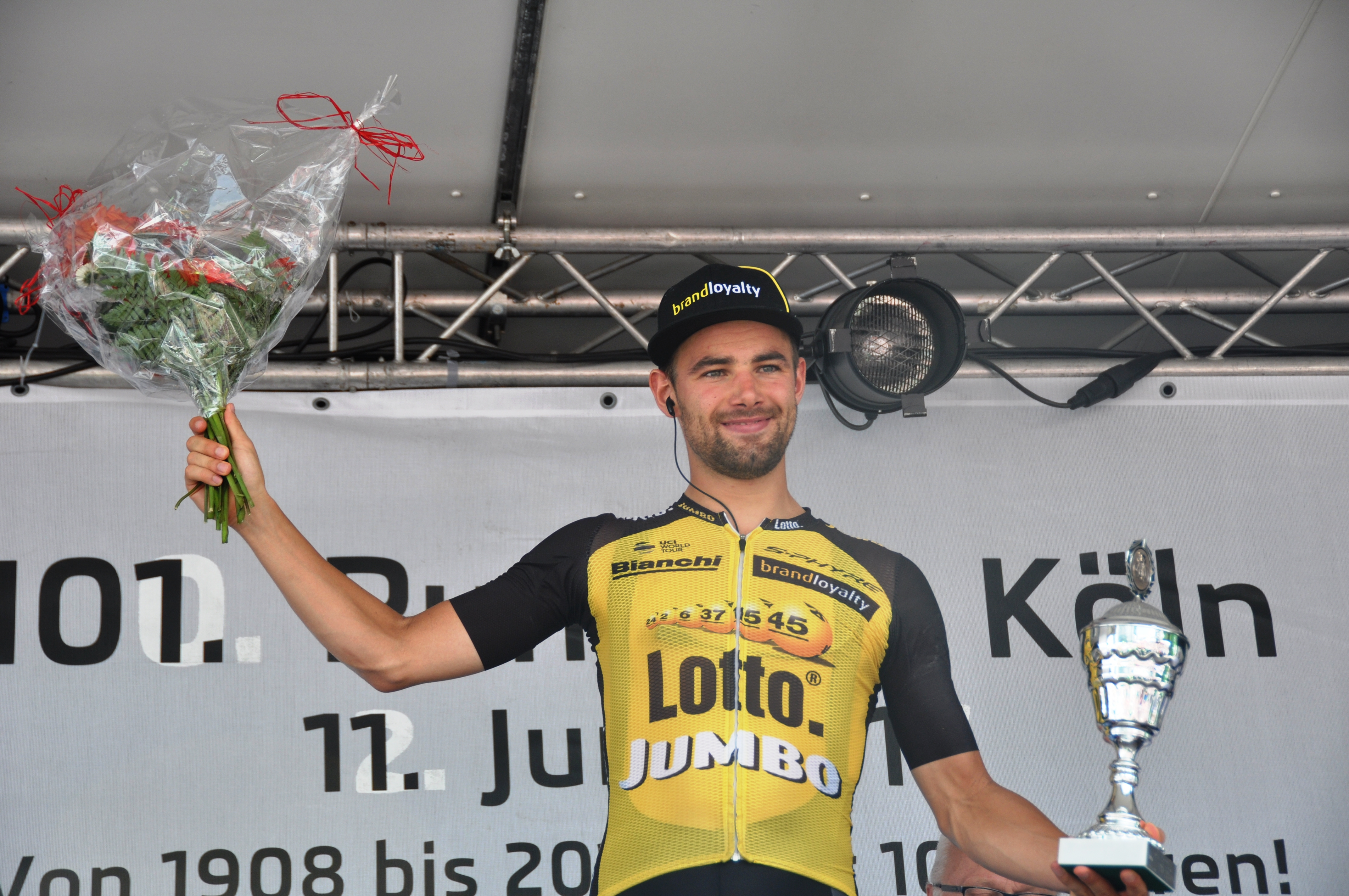 Victor Campanaerts, Sieger der Bergwertung